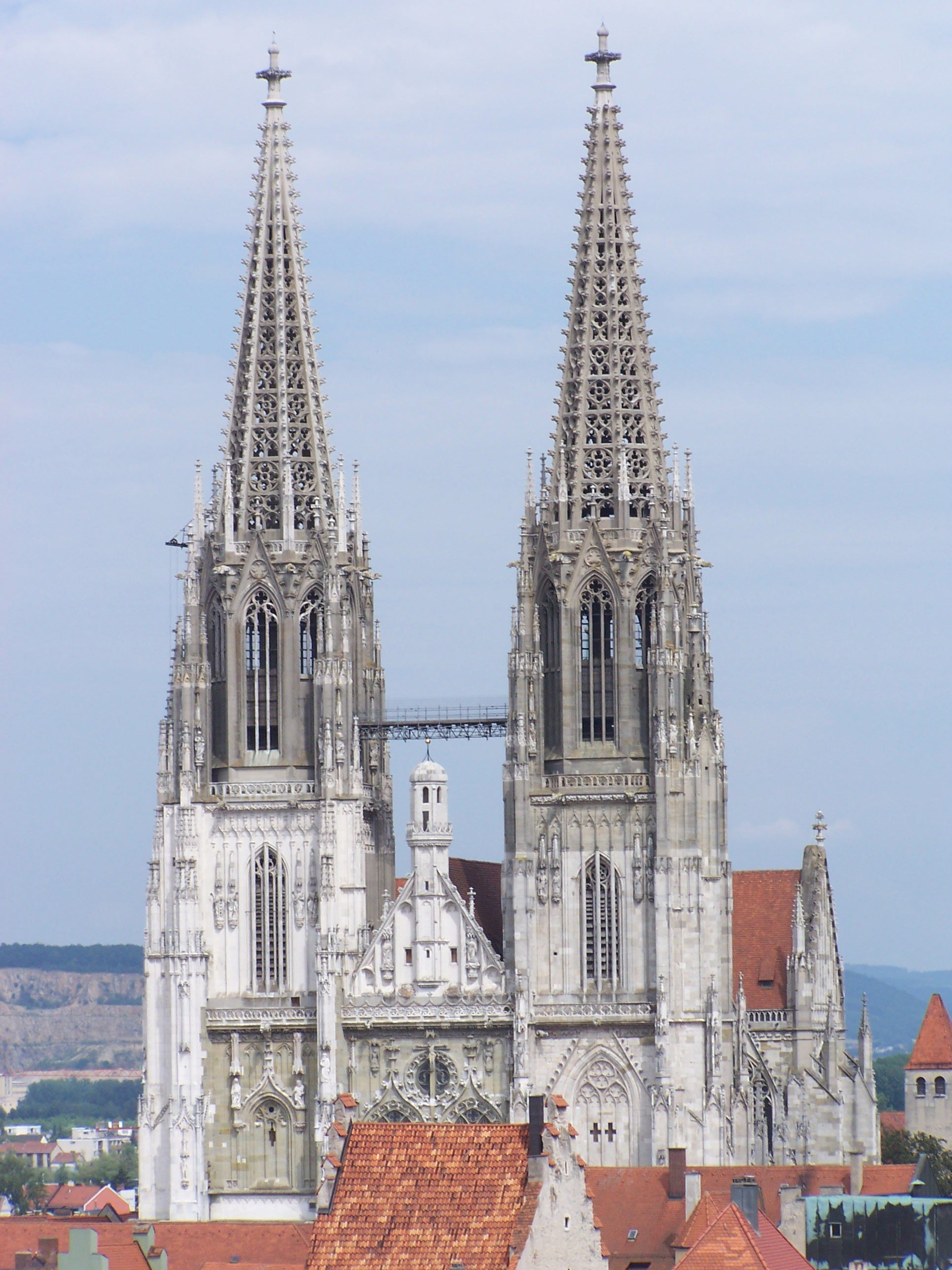 St. Peter; Regensburg